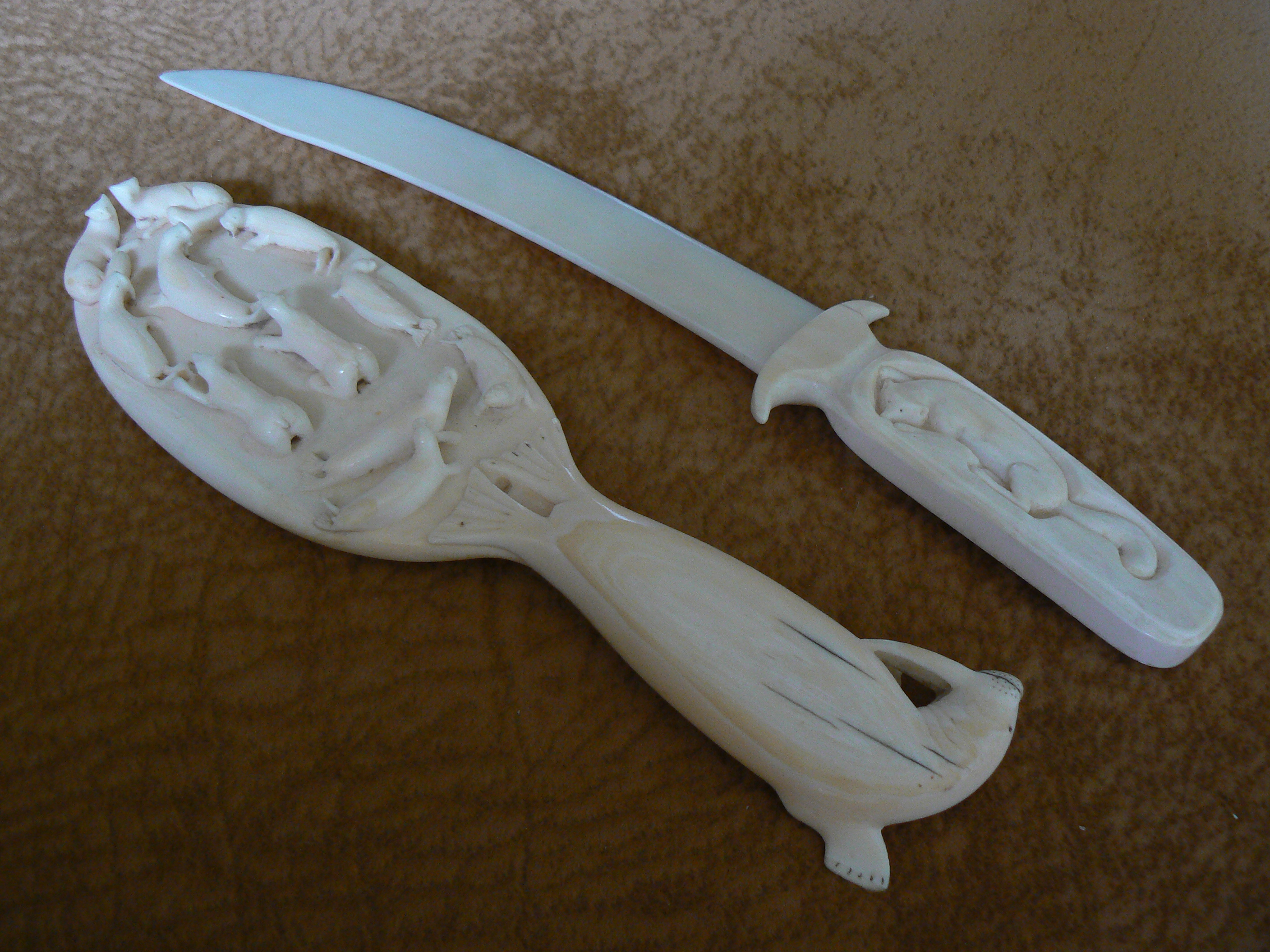 Резная моржовая кость. Чукотка. 20-е годы XX века. Частное собрание.